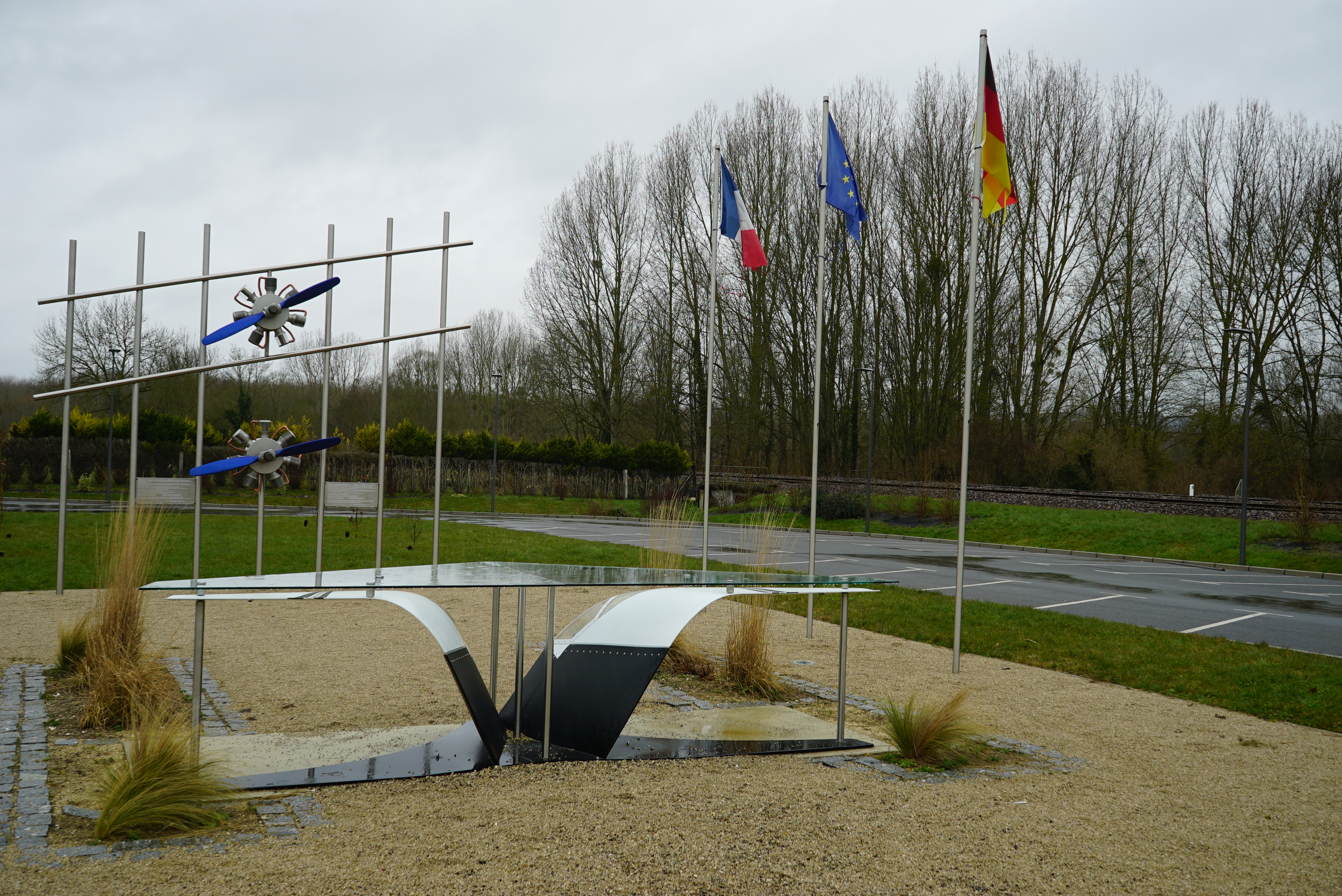 commémoration de la première bataille aérienne.